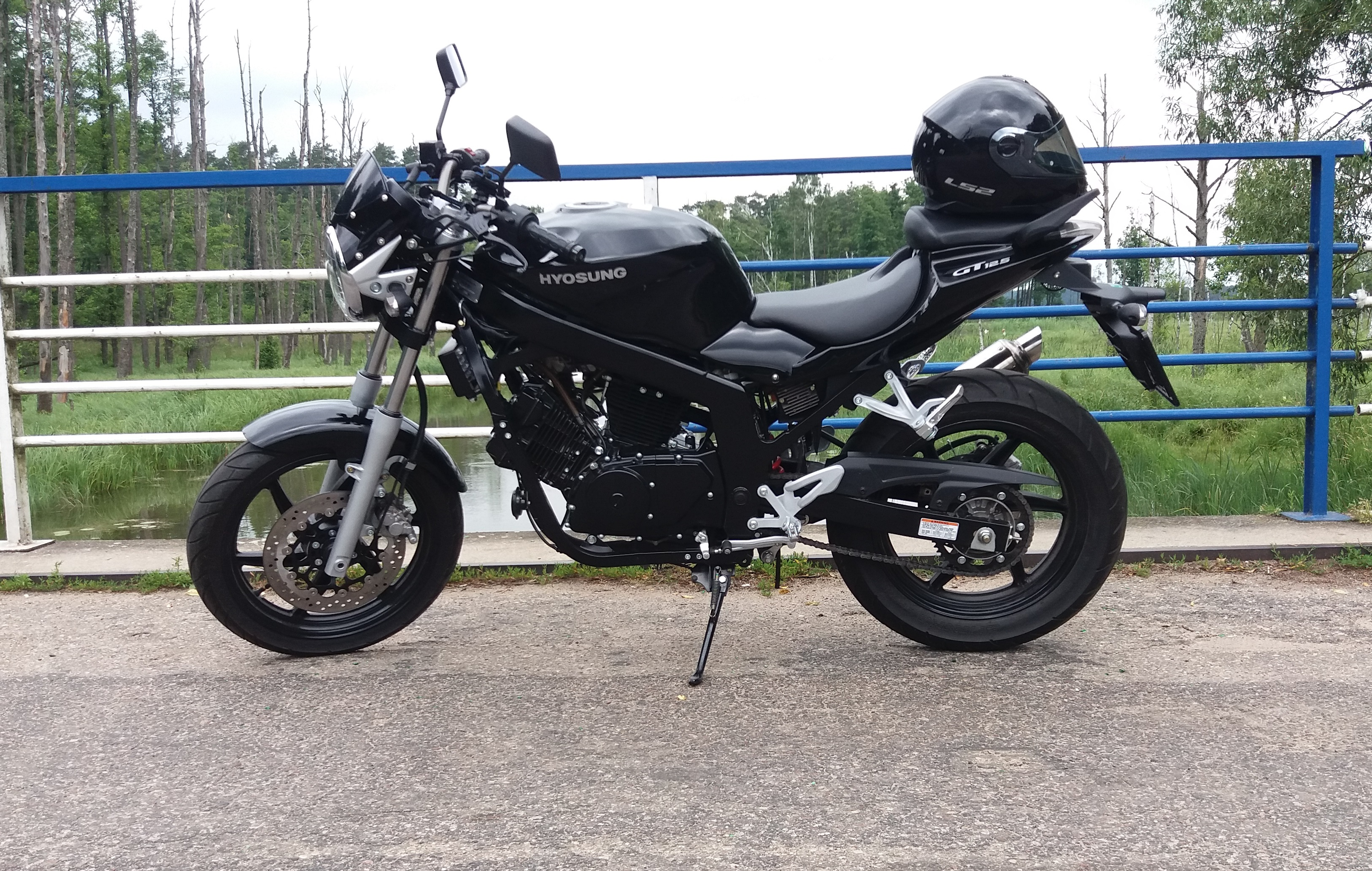 Motocykl Hyosung GT 125 NE z roku 2015